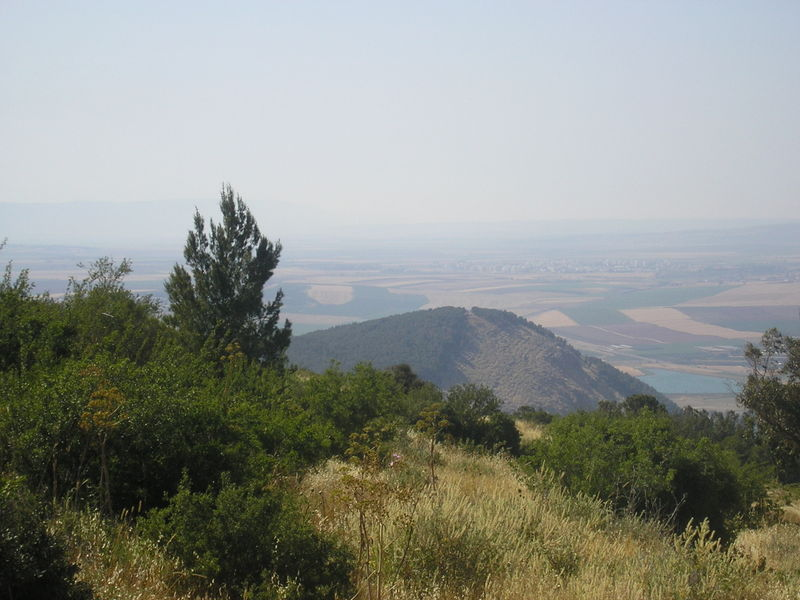 הרי הגלבוע. מבט מערבה אל עבר עמק יזרעאל מפסגת הר ברקן. צולם על ידי